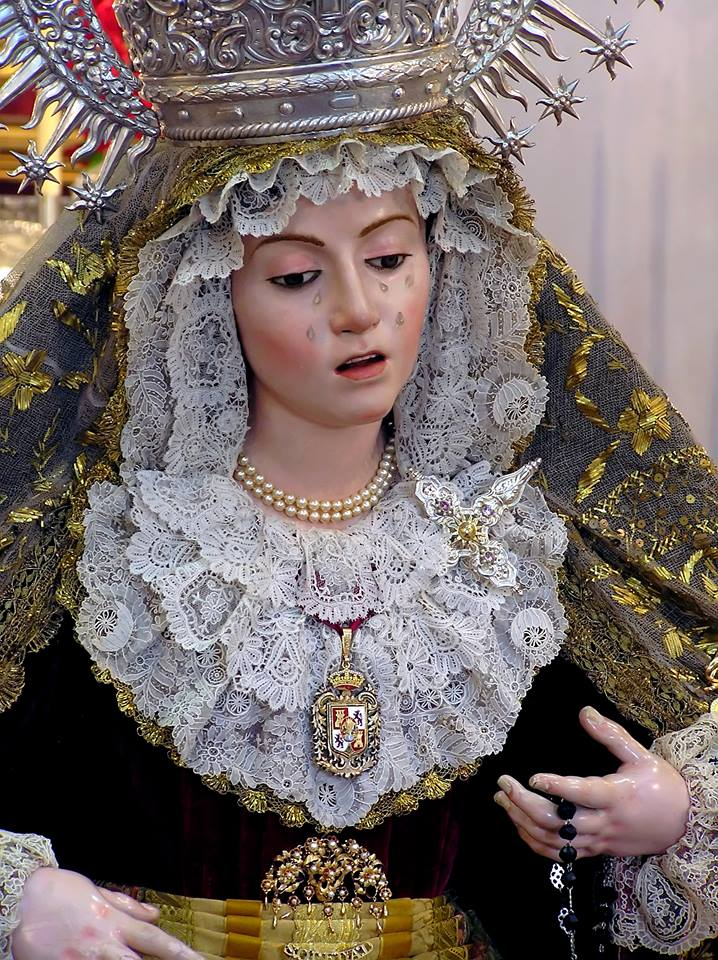 Ntra Sra de la Soledad, Puerto Real (Cádiz) obra de Luisa Ignacia Roldán, La Roldana en 1688